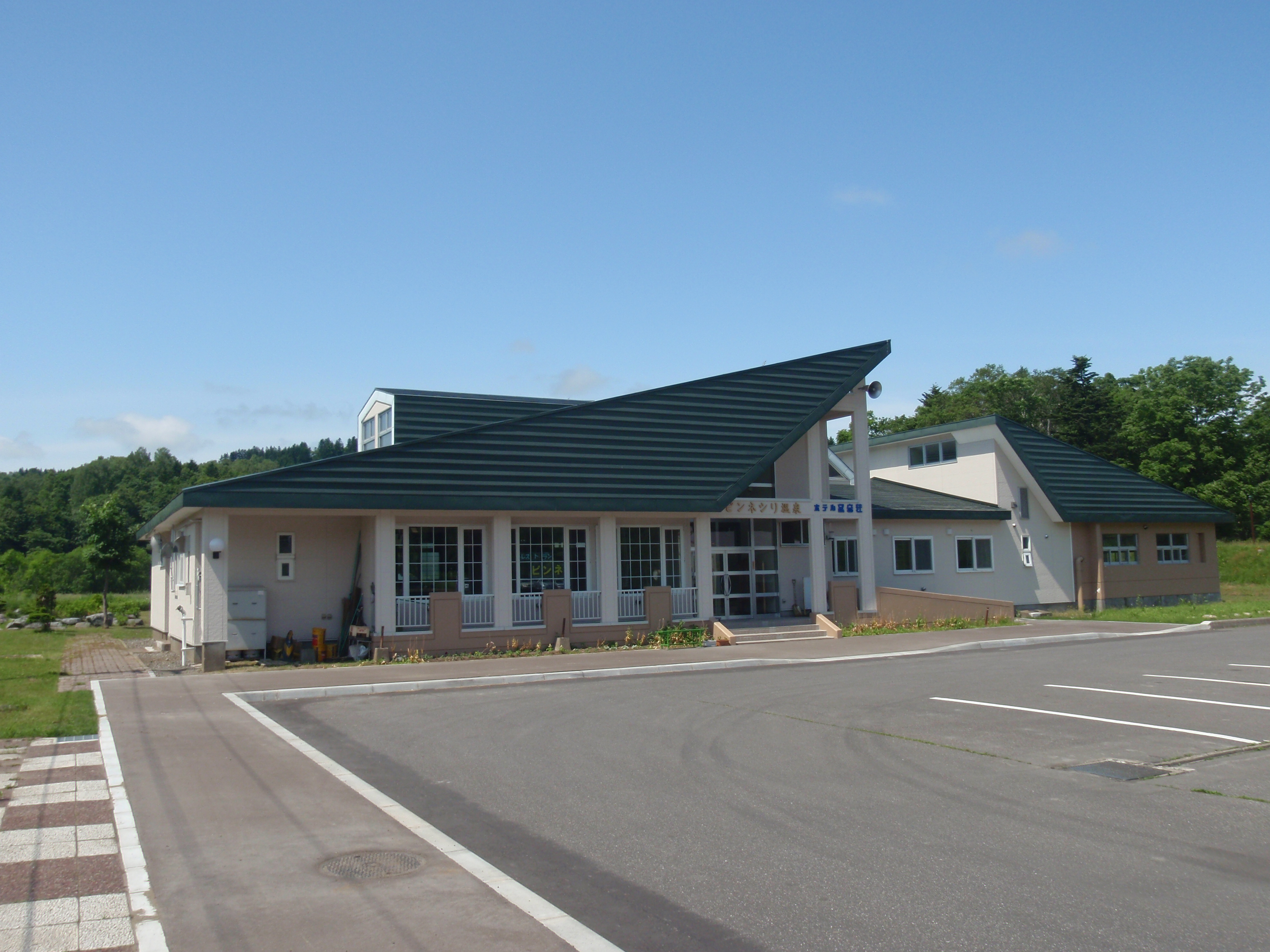 ピンネシリ温泉、望岳荘